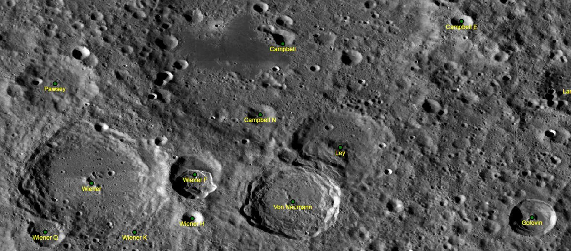 Cráter lunar Ley. Localización (Imagen LRO)